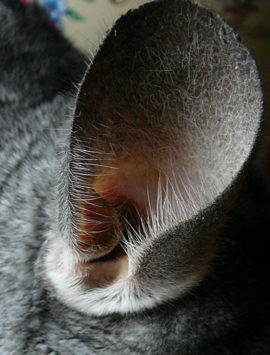 Chinchilla's ear / oreille de chinchilla - Chinchilla domestique gris adulte